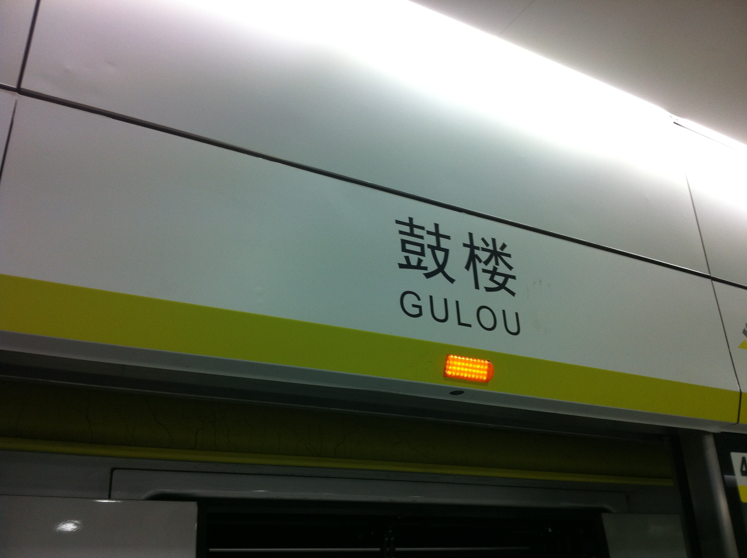 天津地铁二号线鼓楼站